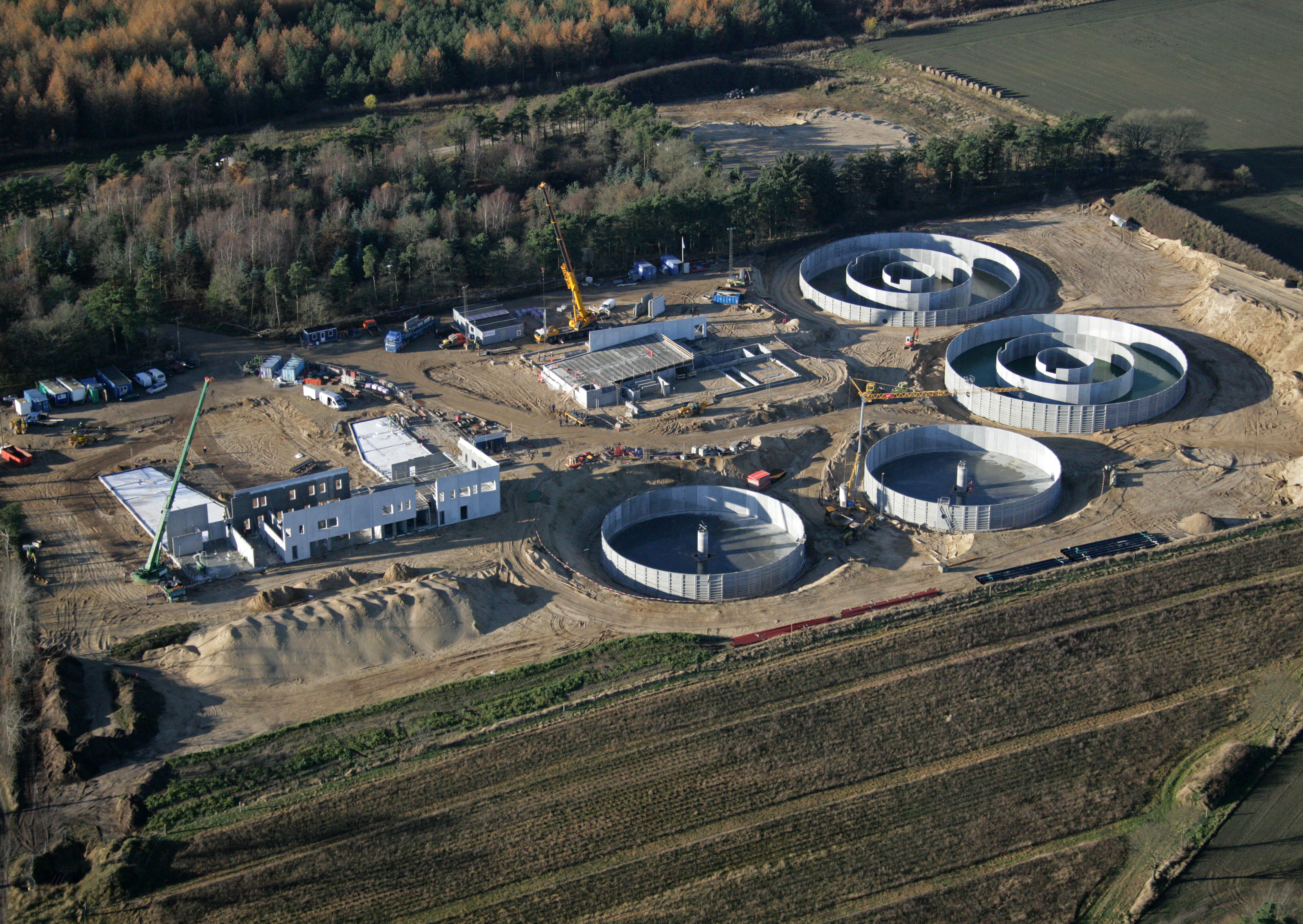 Mariagerfjord Renseanlæg set mod nord. Foto november 2012